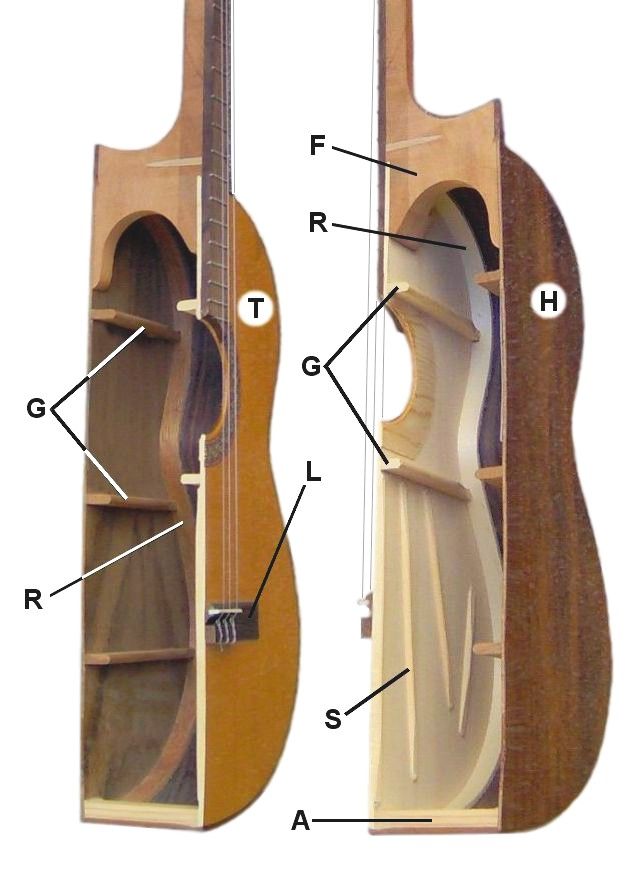 A klasszikus gitár testének belső felépítése (A) alsó tőke (F) felső tőke (T) tető (S) sugárgerendák (R) ragasztólécek (H) hát (G) keresztgerendák